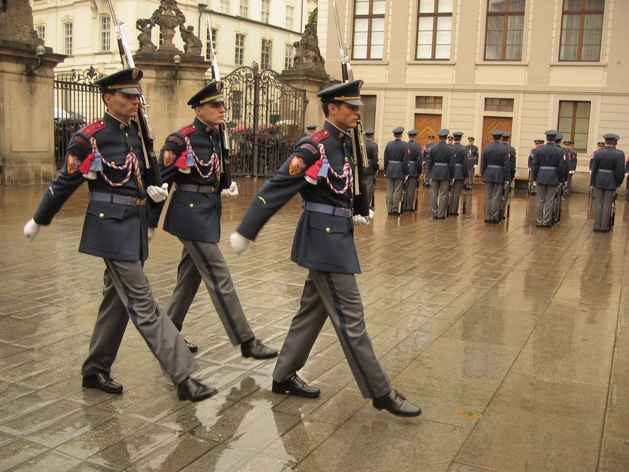 Praha, Hradní stráž